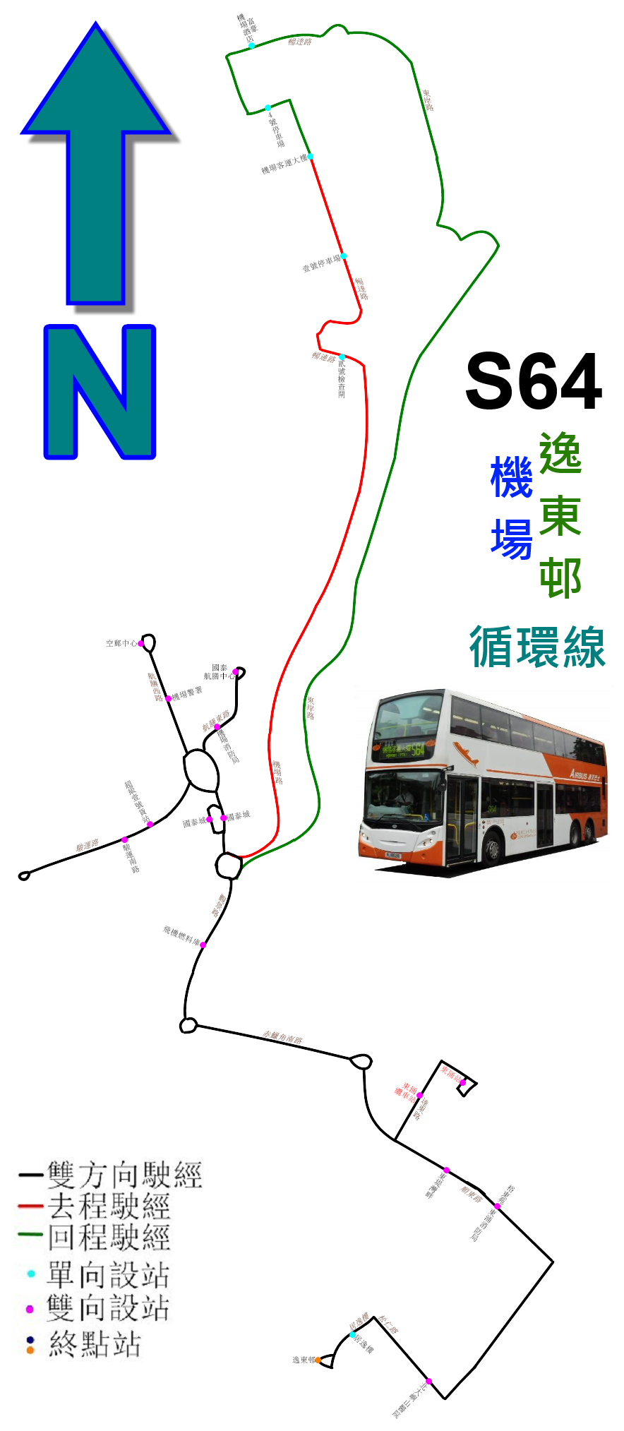 中文（香港）: 龍運巴士S64線的走線圖